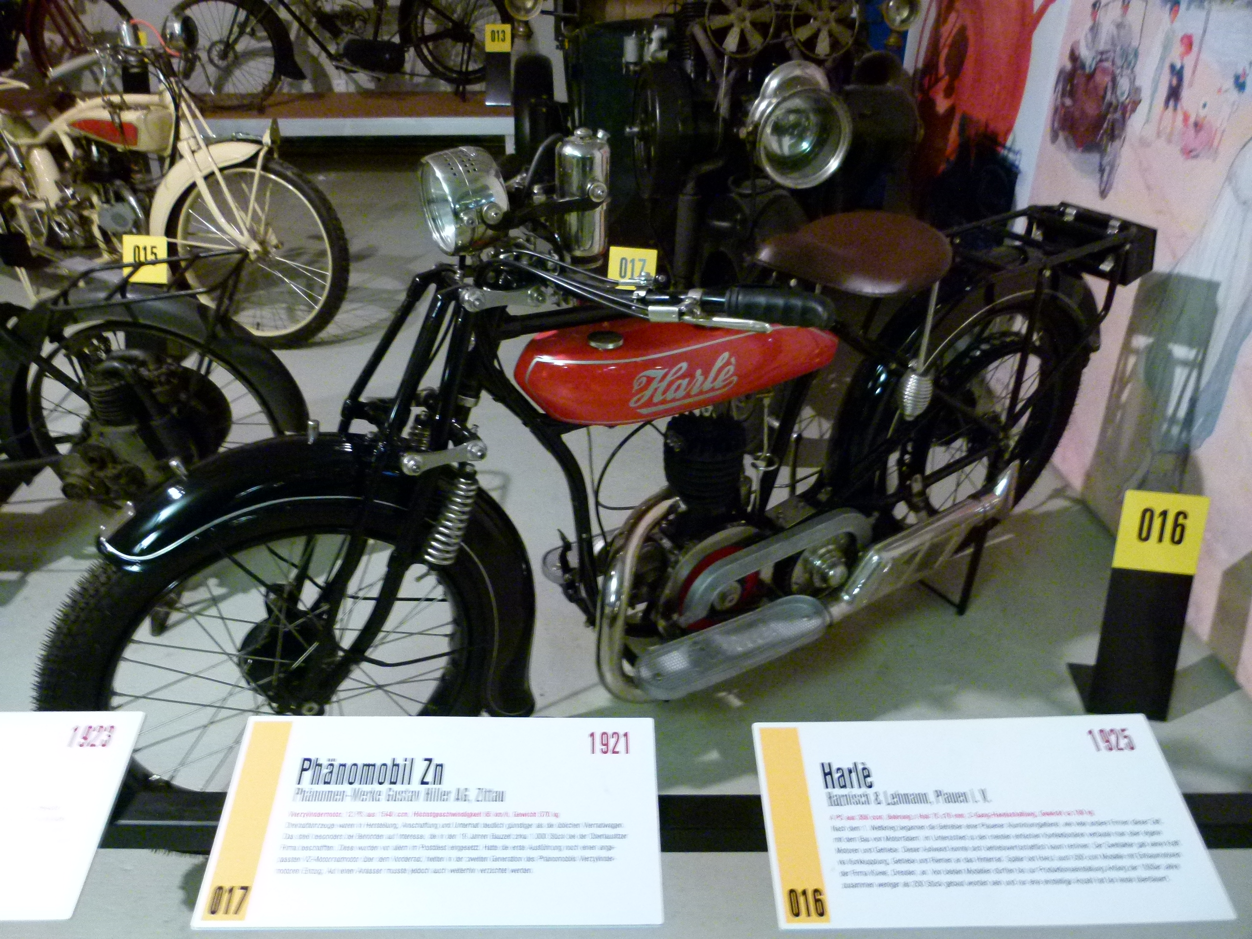 Harlè-Motorrad, Harnisch & Lehmann, Plauen, 1925 Fahrzeugmuseum Chemnitz